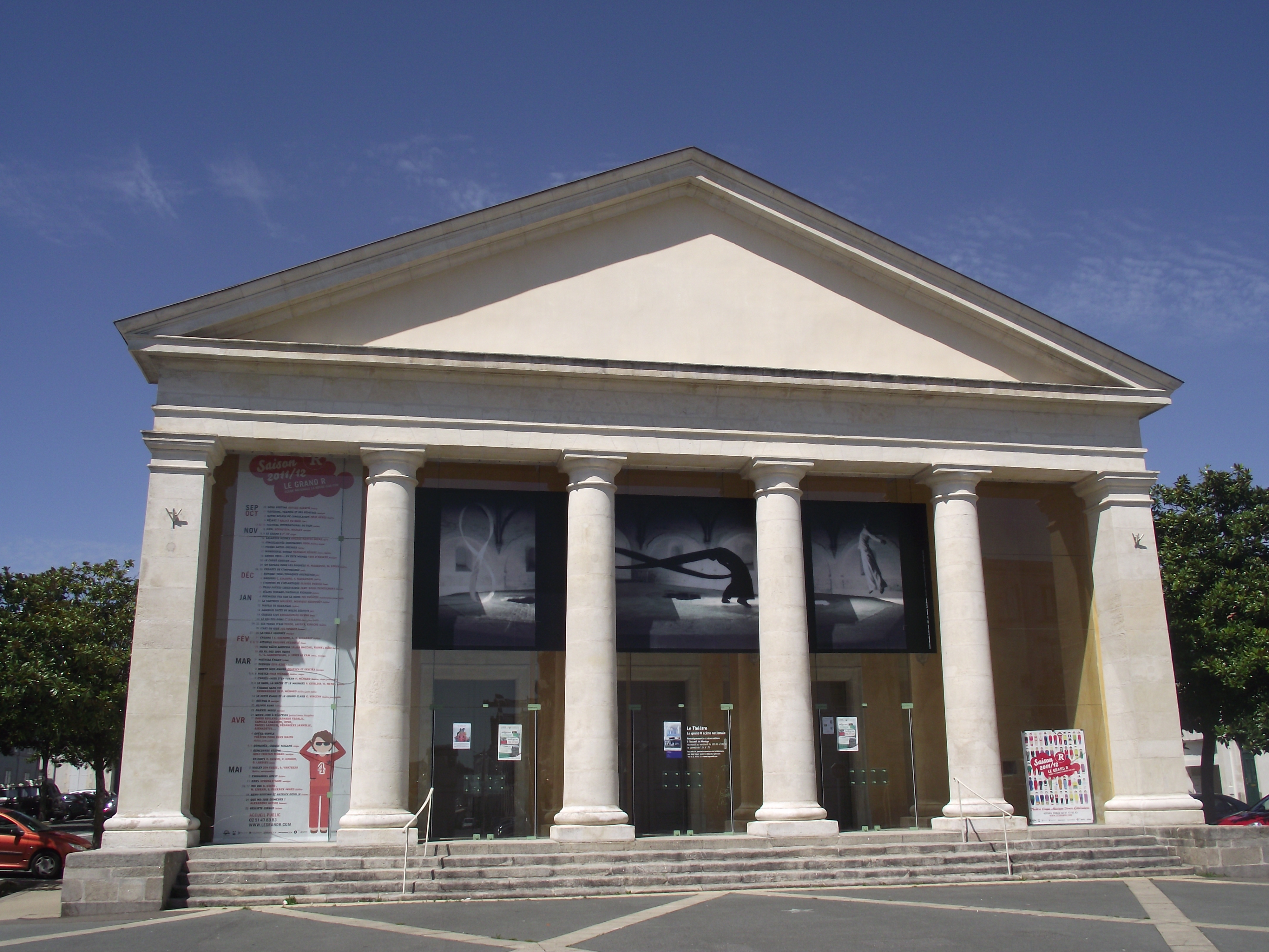 Le théâtre de La Roche-sur-Yon .